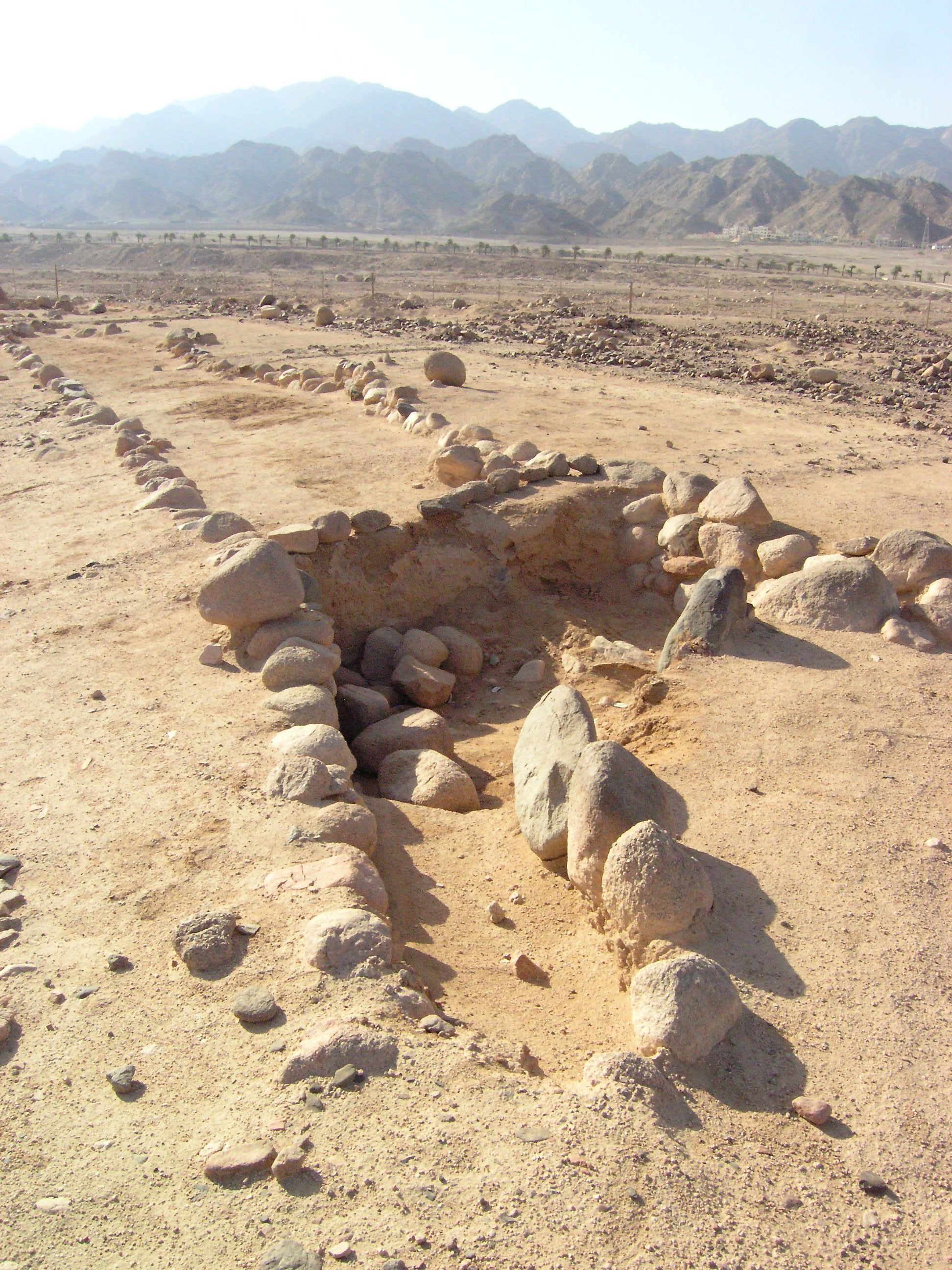 Reste von wasserwirtschaftliche Anlagen beim Tall Hujayrat al-Ghuzlan, Jordanien